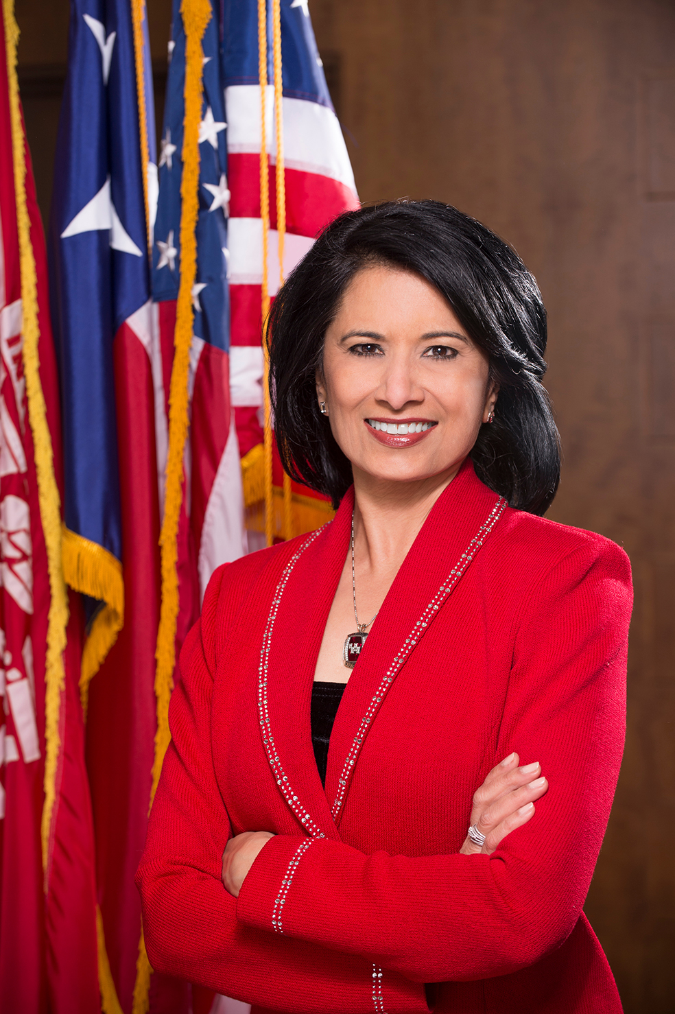 Renu Khator